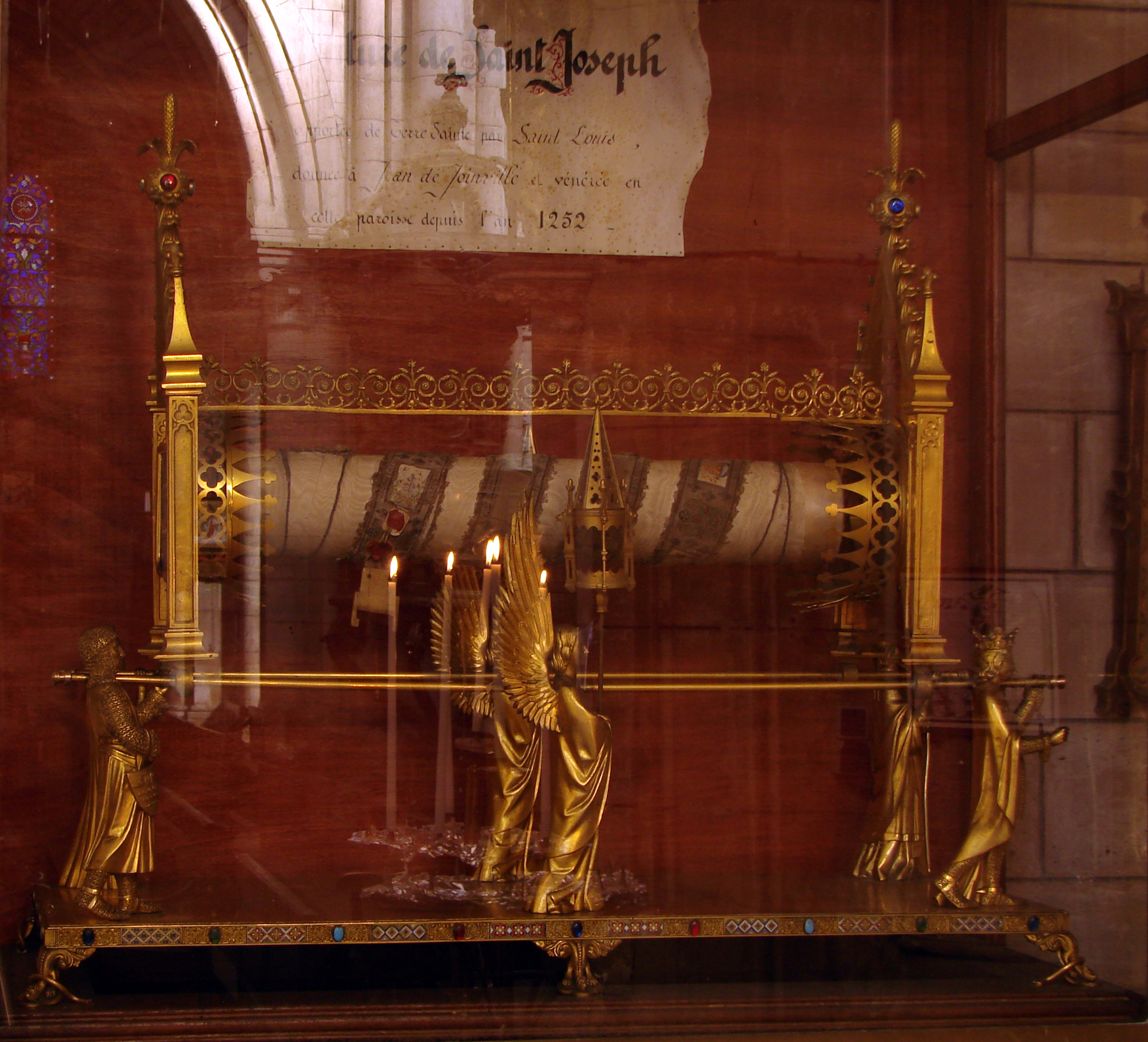 Reliquaire de la "ceinture de Saint Joseph". Cette ceinture de chanvre a été donnée en 1248 par Saint Louis à Jehan, sire de Joinville, qui l'a rapportée à Joinville en 1250. Elle est placée dans une gaine brodée de fleurs de lis et des litanies de Saint Joseph, avec des jours rectangulaires permettant de voir la relique. Le tout est présenté dans un reliquaire néogothique du 19ème siècle.